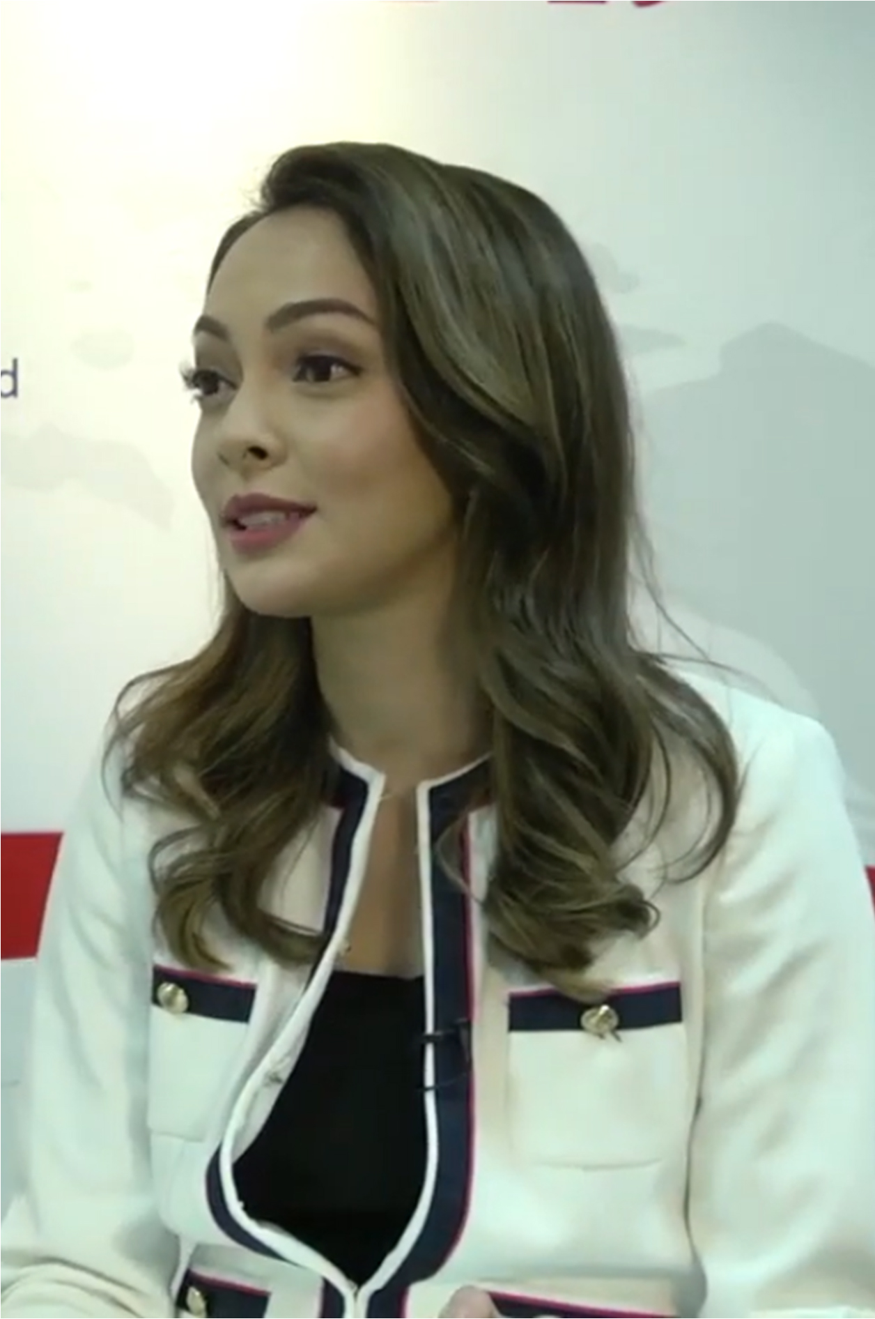 ReisaBrotoAsmoro #GugusTugasCOVID19 ANTARA - Anggota tim komunikasi Gugus Tugas Percepatan Penanganan COVID-19 Reisa Broto Asmoro mengaku tidak memperhatikan komentar miring tentang dirinya, saat diamanahkan pekerjaan baru oleh pemerintah. Reisa ingin memberikan perhatian lebih kepada masyarakat agar disiplin dalam mematuhi protokol kesehatan. Bukan hanya itu, ia memiliki semangat yang sama dengan tim gugus tugas agar pandemi COVID-19 ini dapat segera berakhir.(Nabila Charisty/Subur Atmamihardja, Syahrudin/Satrio Giri/Sizuka)